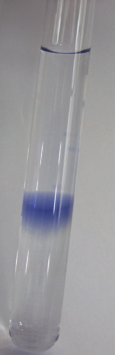 Ein blauer Ring aus Chrom(VI)-Peroxid. Analysenmethode: 4 mL Salpetersäure (20%) werden mit 1 ml Wasserstoffperoxid (30%) gemischt und mit Diethylether überschichtet. Die auf Chrom zu untersuchende Probe wird vorsichtig unter den Ether geschichtet. Bei Anwesenheit von Chrom bildet sich ein blauer Ring aus Chrom(VI)-peroxid.